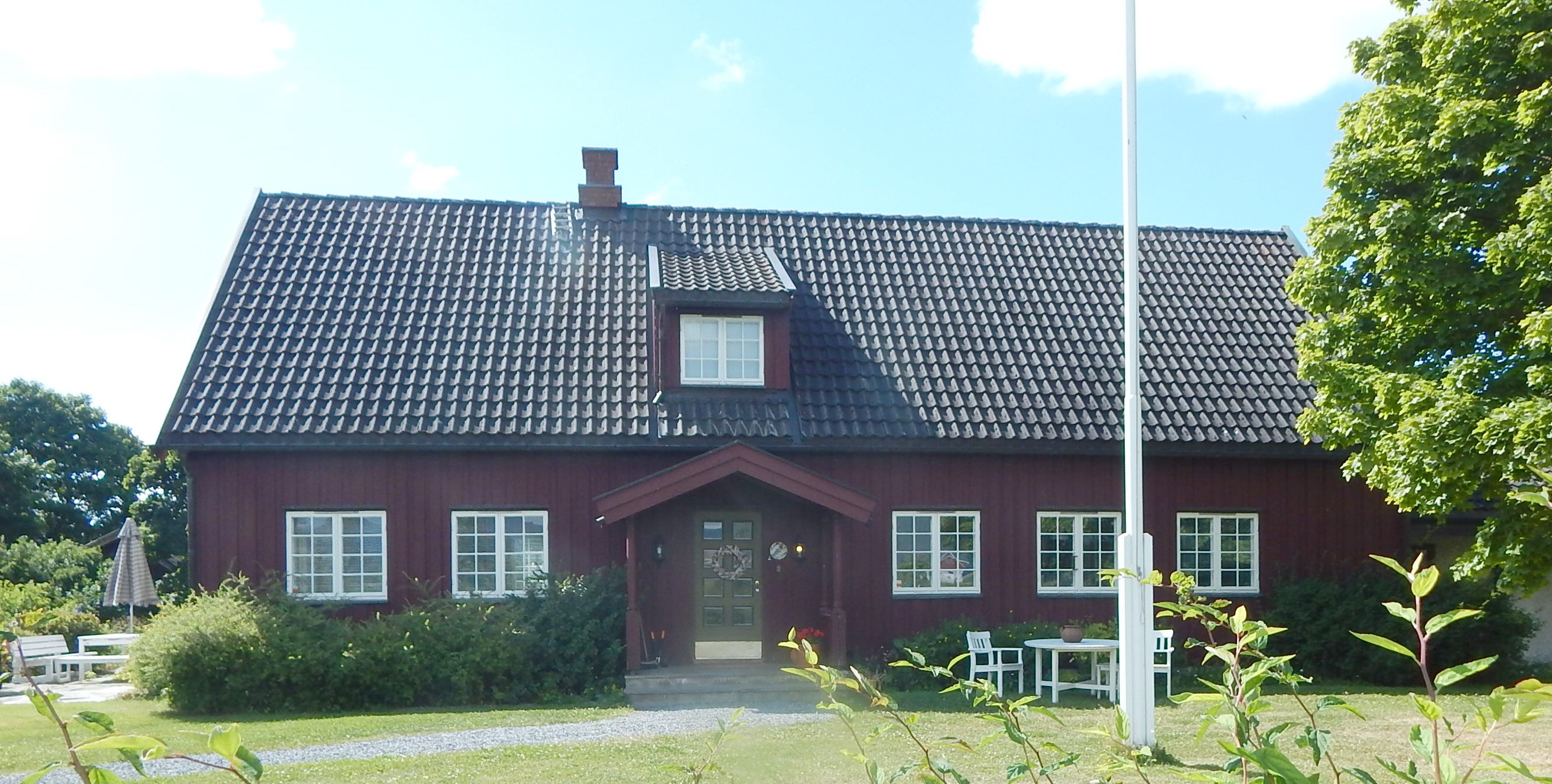 Våningshuset ved Gran prestegård på Granavollen